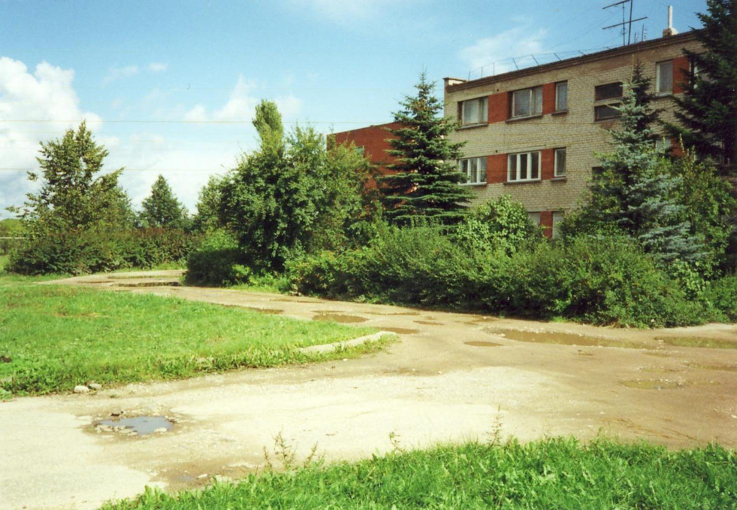 Miškų urėdijos gyvenvietė, Jonava